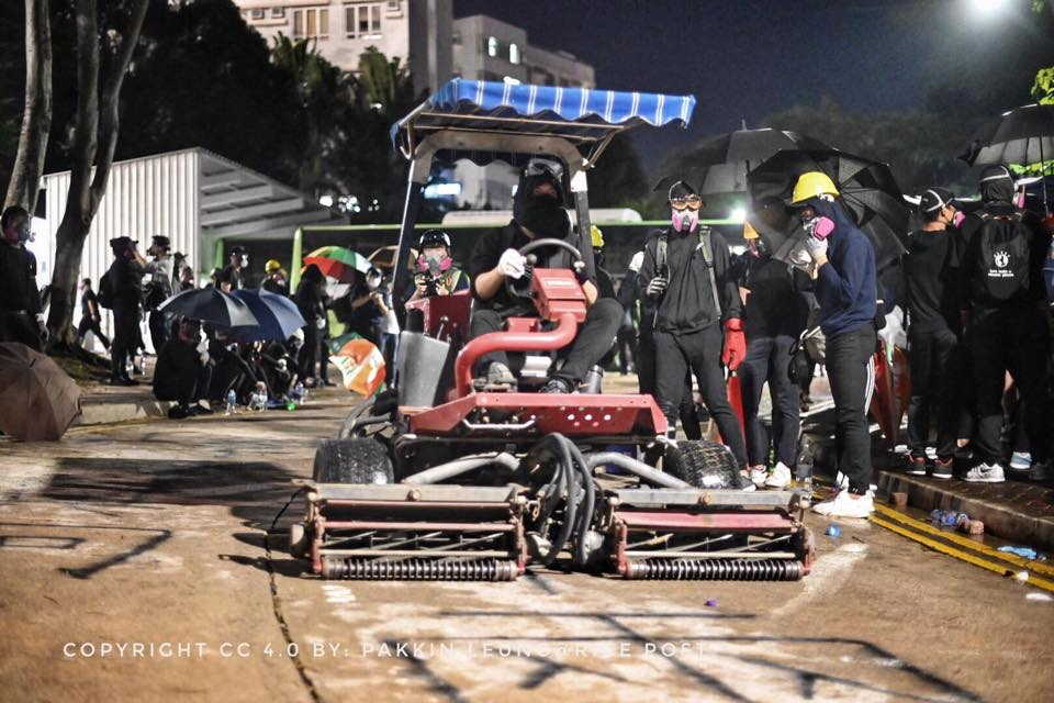 中大戰況慘烈多人受傷，無一刻無催淚煙味，每十秒起碼有一發唔同嘅子彈，學生受傷。